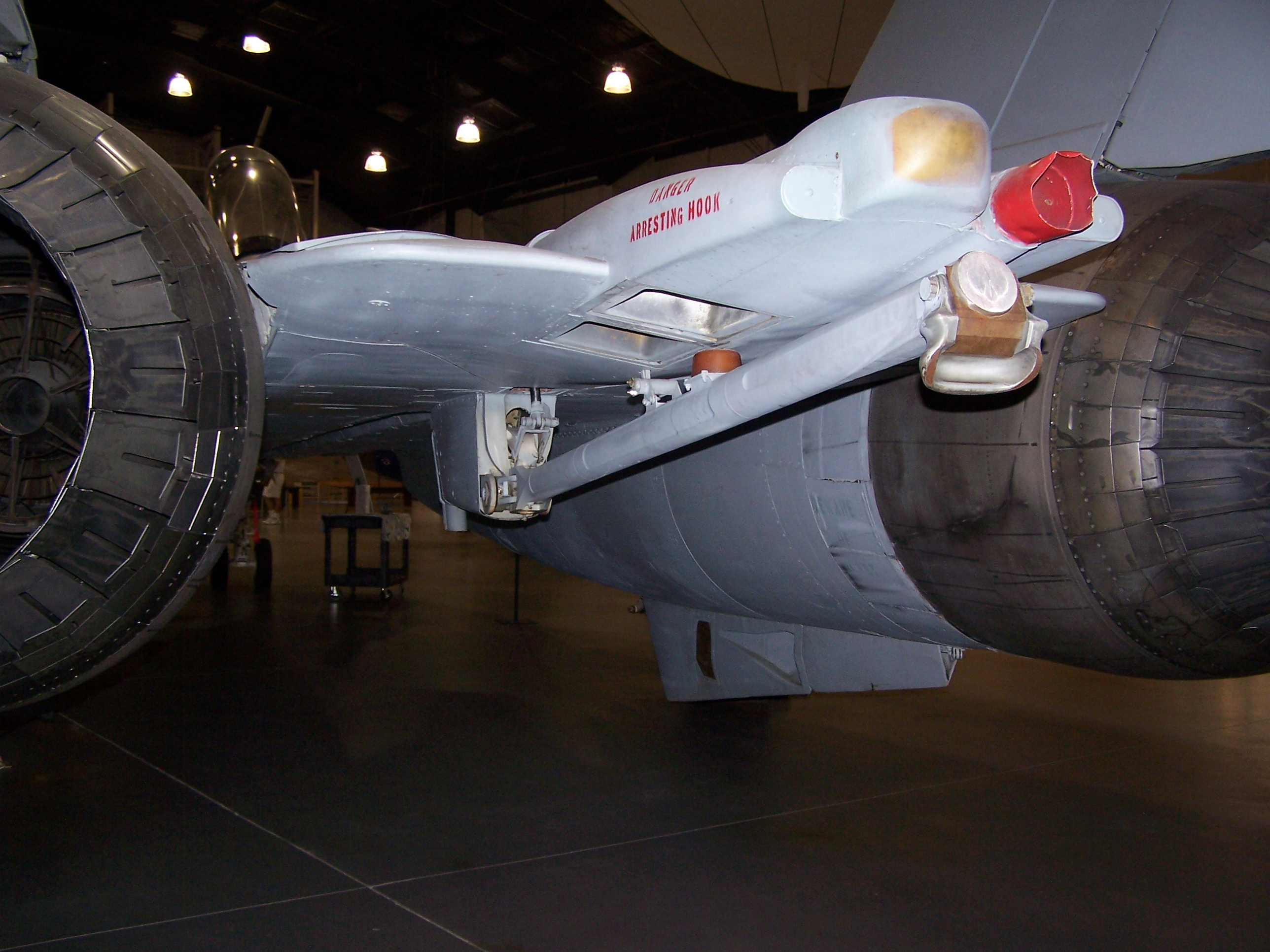 F-14 Fanghaken